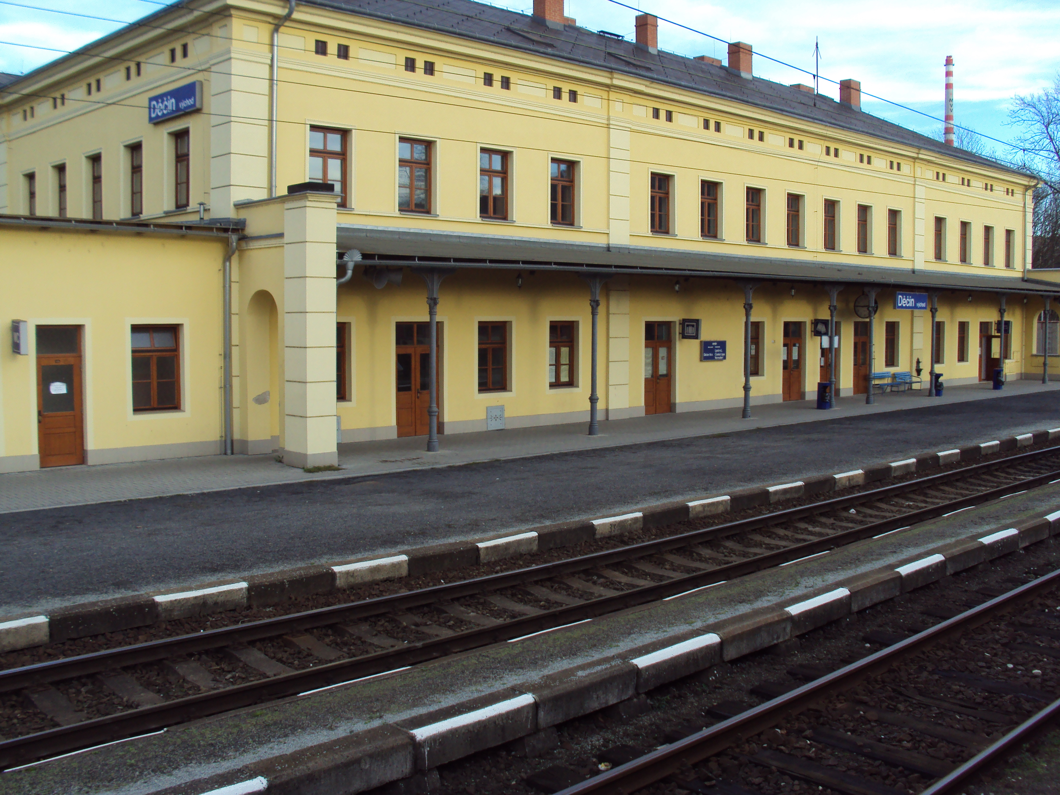 Vlakové nádraží Děčín východ